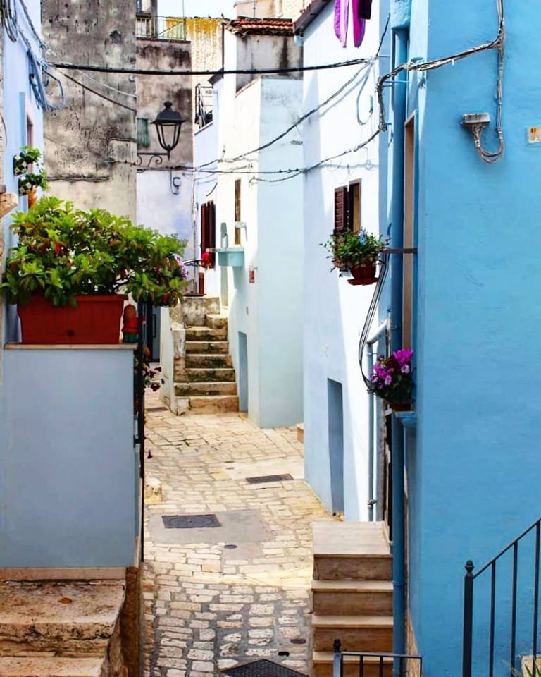 Casamassima, il paese azzurro di puglia. Via Paliodoro